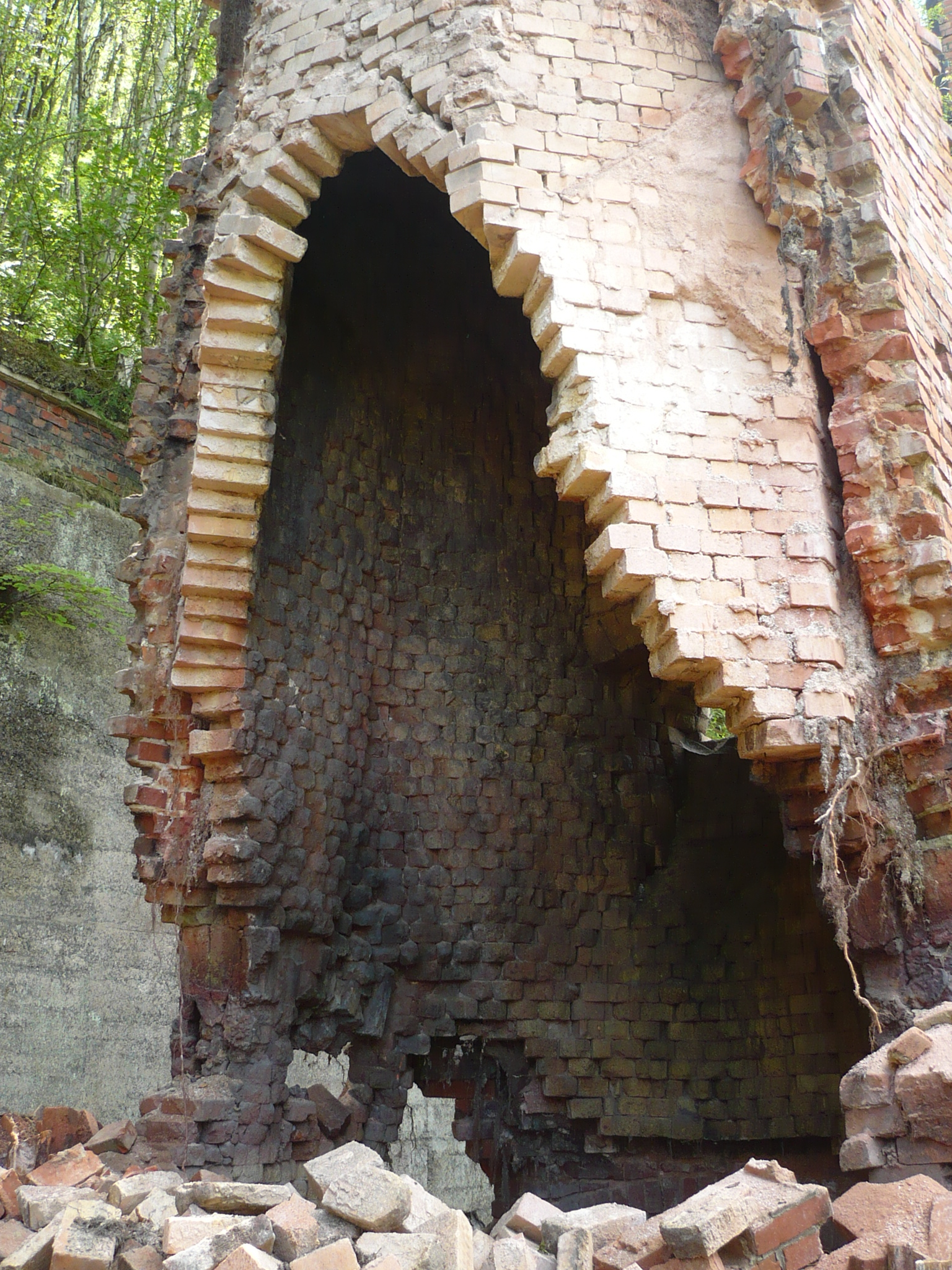 Nowa Ruda, piec do prażenia łupku